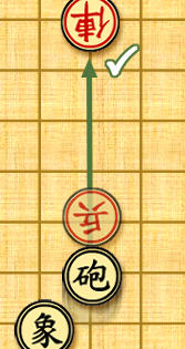 Self-drawn